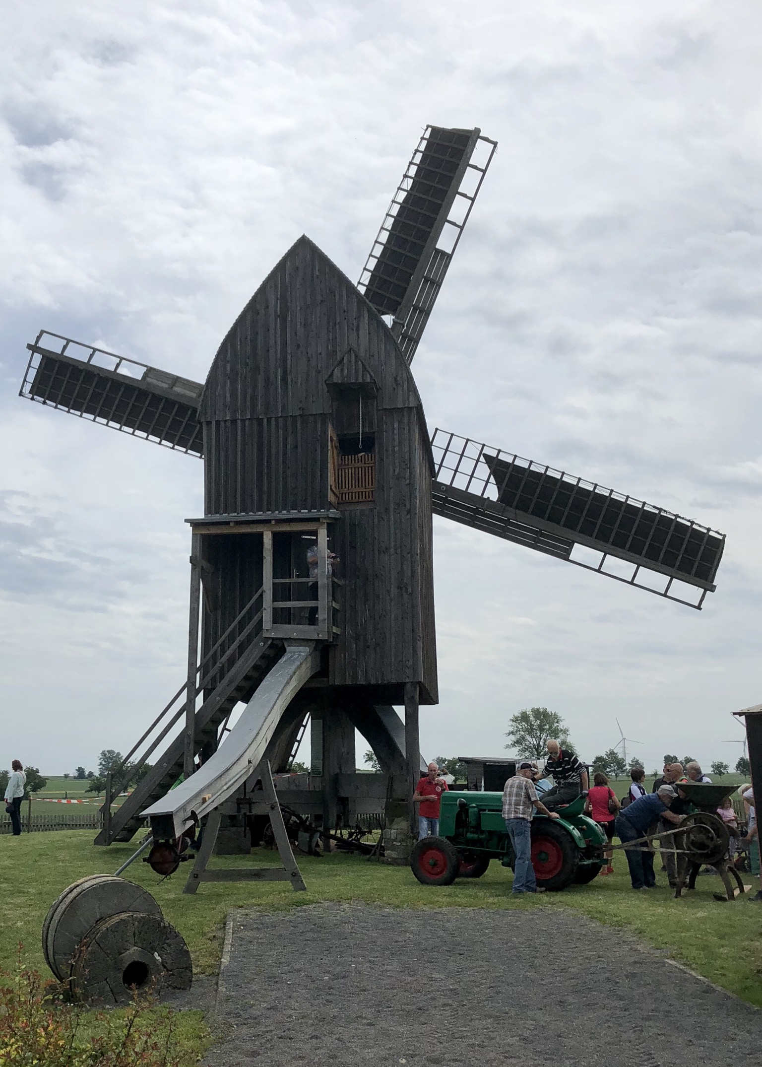 Windmühle südlich von Wulferstedt